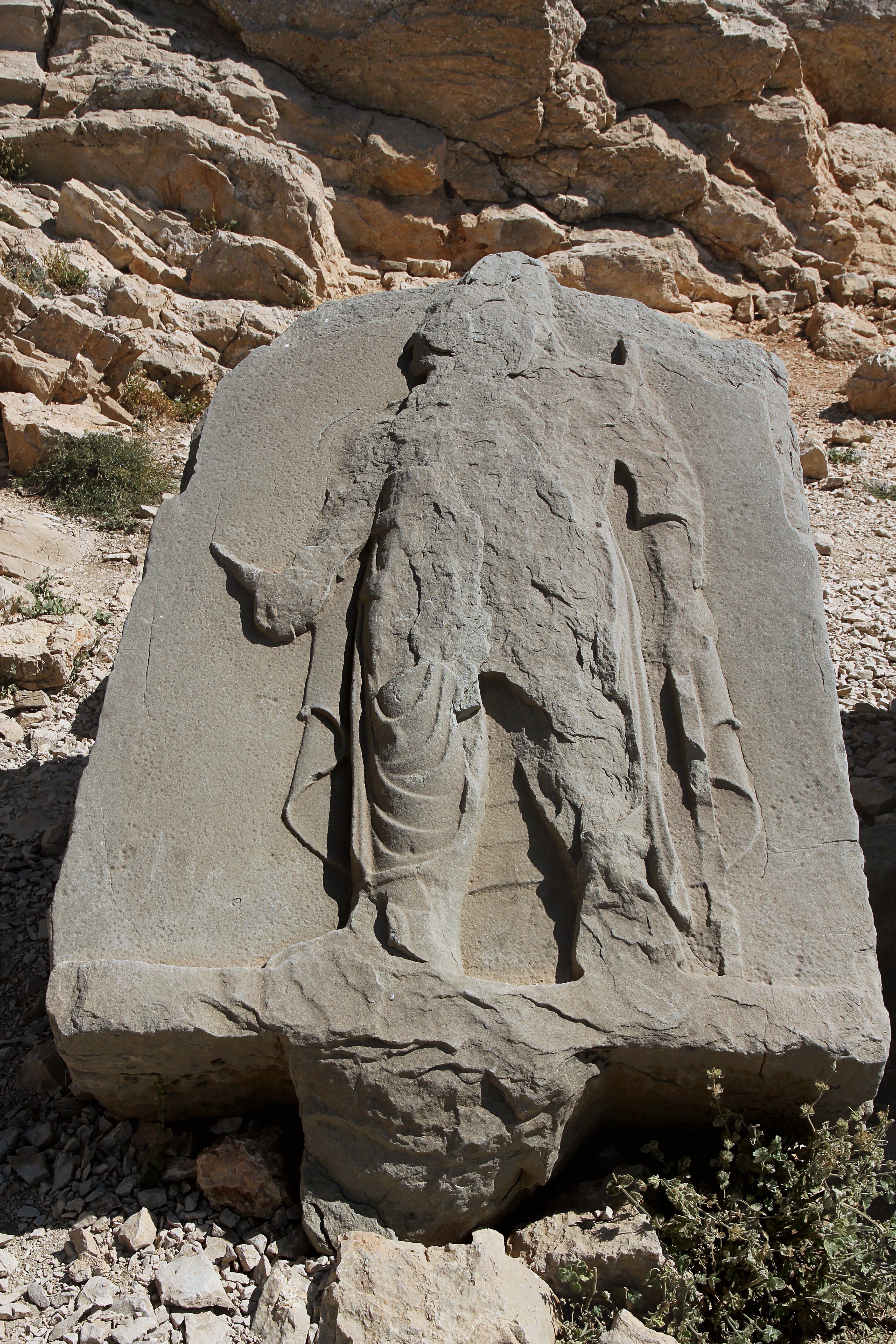 Relief des persischen Vorfahren -danes, Nemrut Dağı, Südosttürkei, Westterrasse